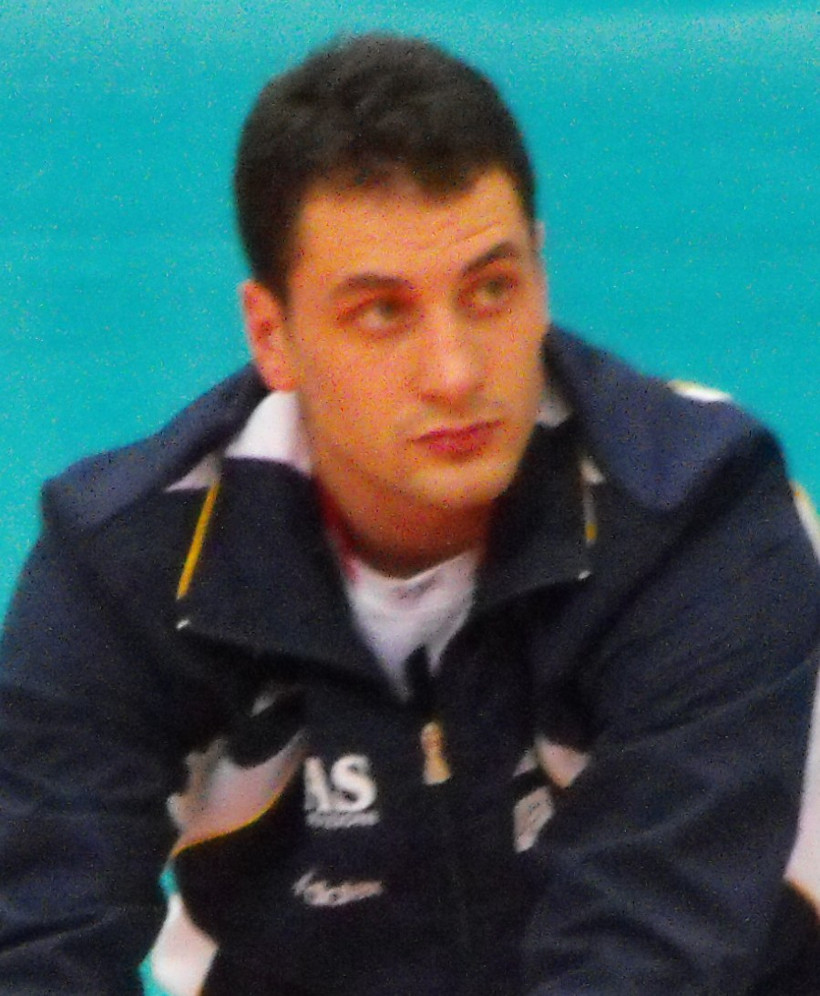 Matey Kaziyski